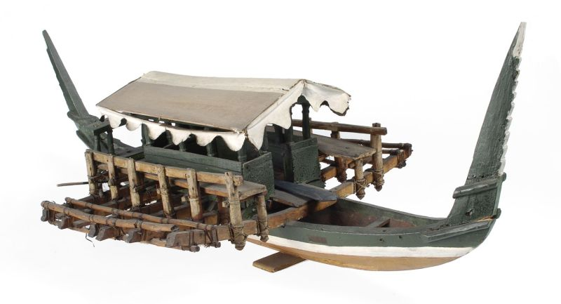 Scheepsmodel. Model van een prauw met een open tent